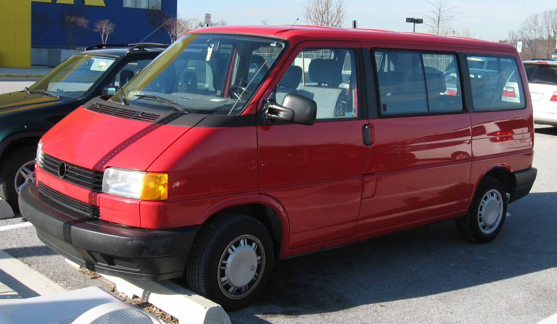 1990-1993 Volkswagen Eurovan photographed in USA.